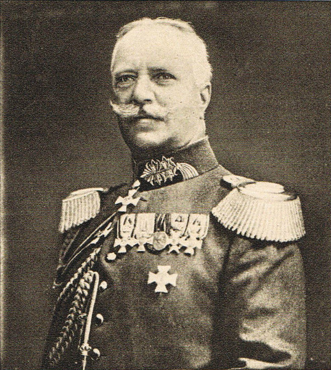 Karl von Conta, führer eines Armeekorps.